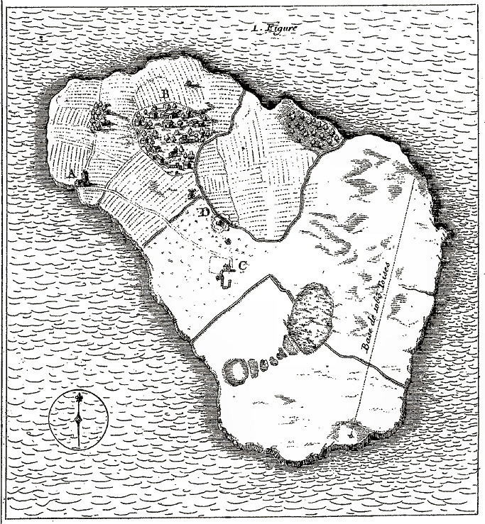 Carte de l'île d'Heven, avec en D l'emplacement d'Uraniborg et la base mesurée par Picard.